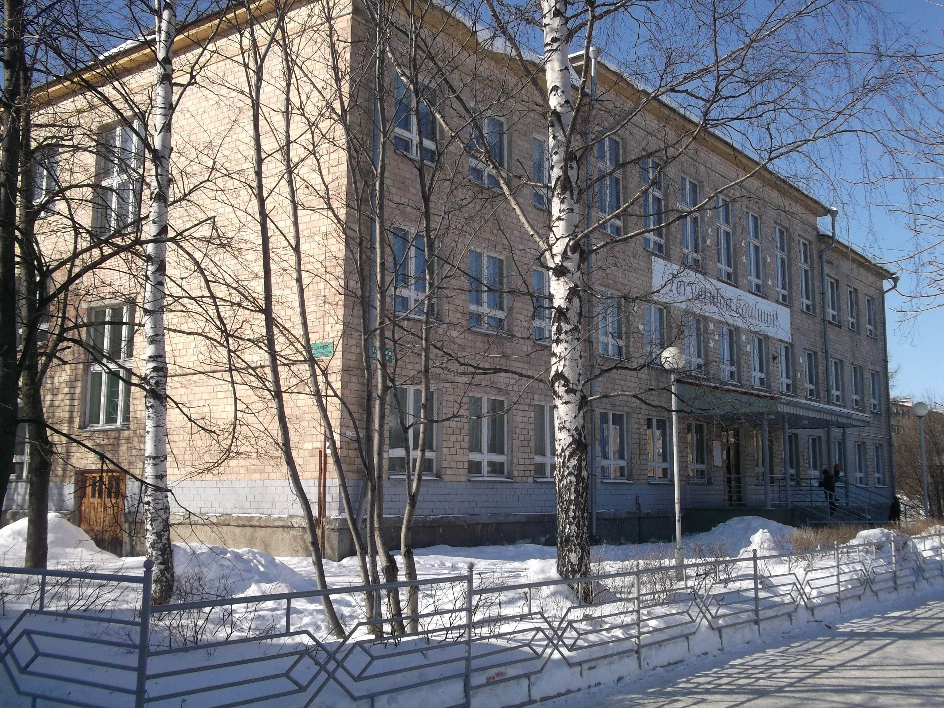 Здание средней общеобразовательной финно-угорской школа имени Элиаса Лённрота в Петрозаводске на ул.Герцена